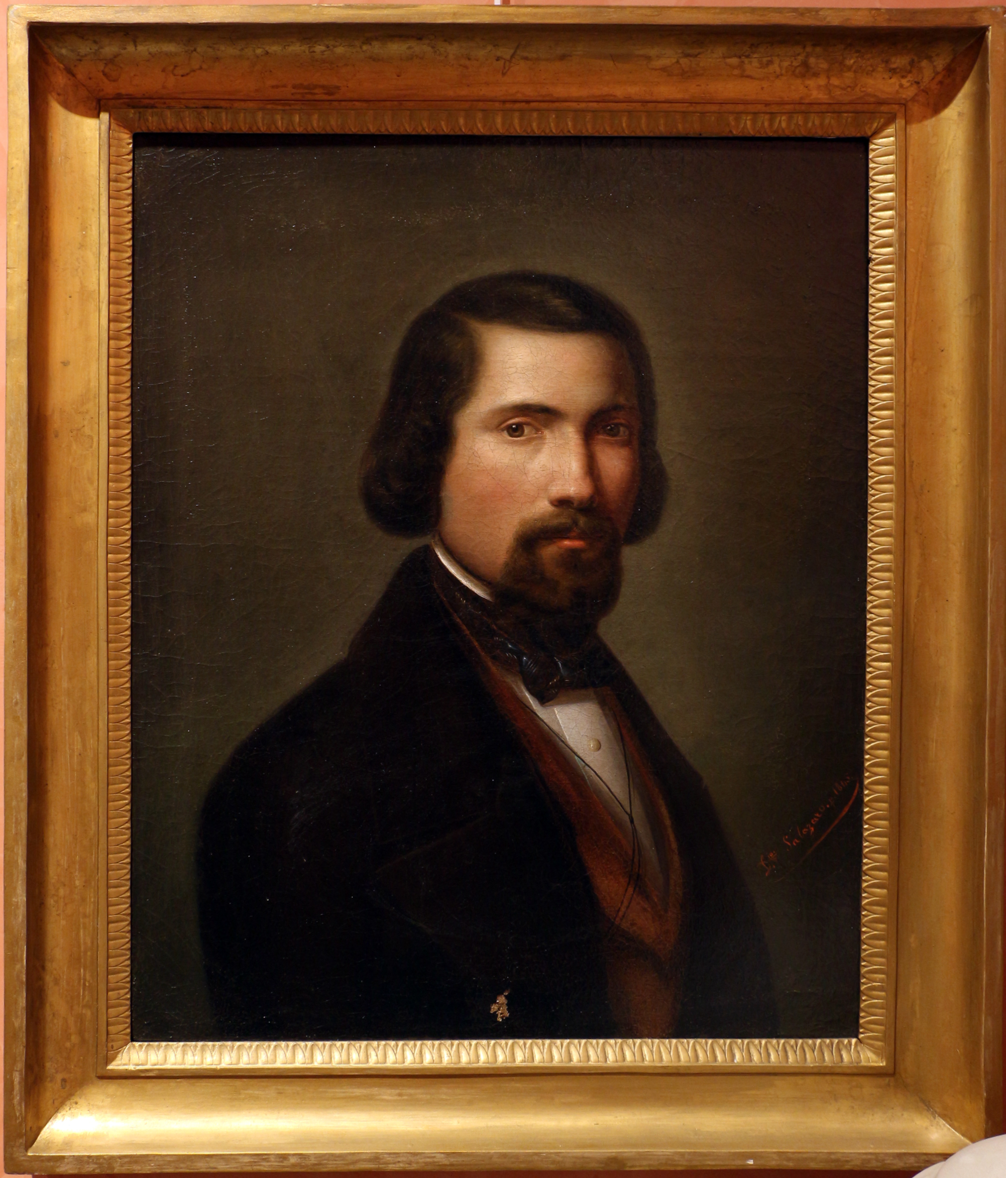 Pinacoteca civica di Reggio Calabria - paintings This is a photo of a monument which is part of cultural heritage of Italy.